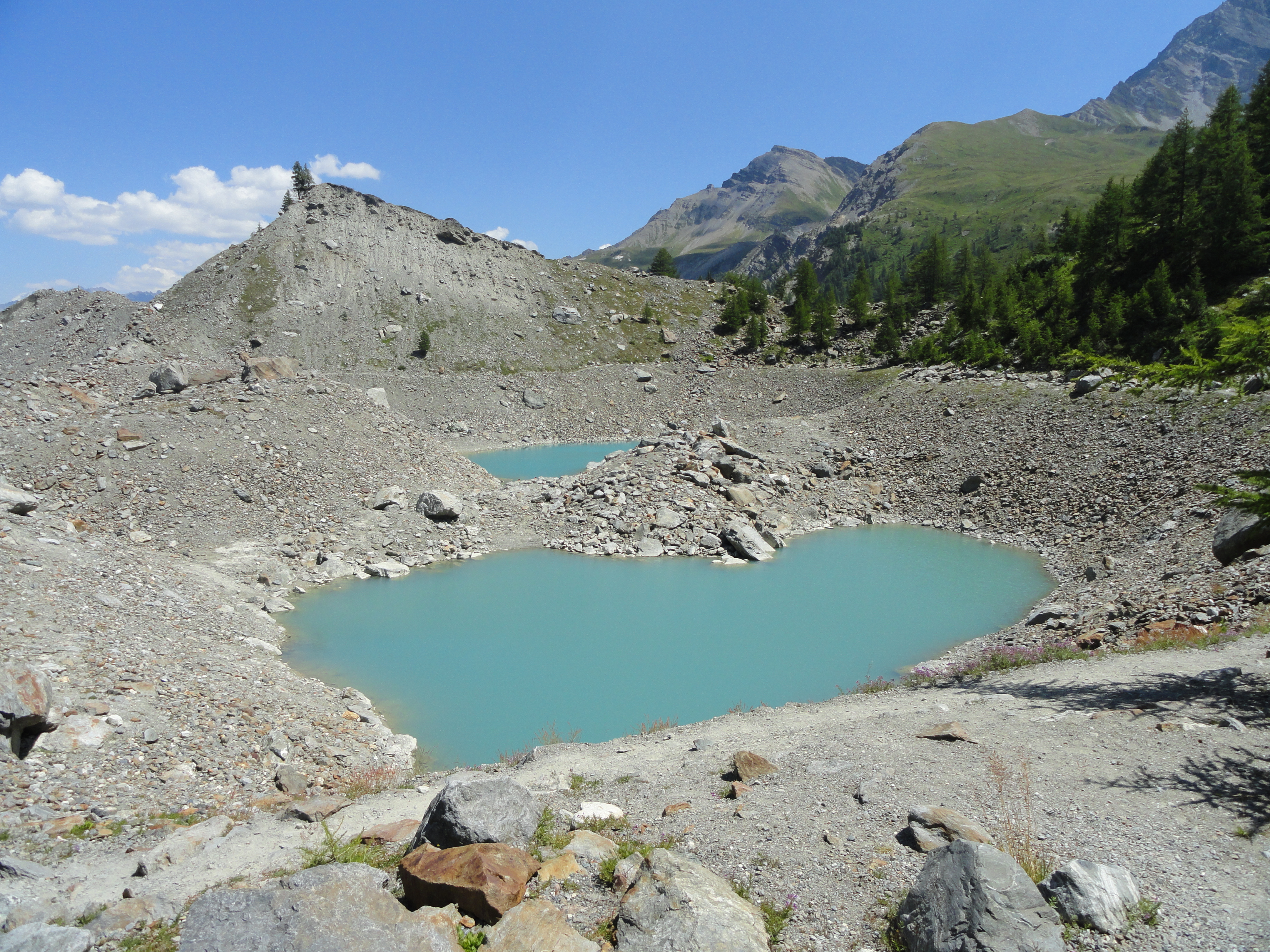 Il lago del Miage in estate